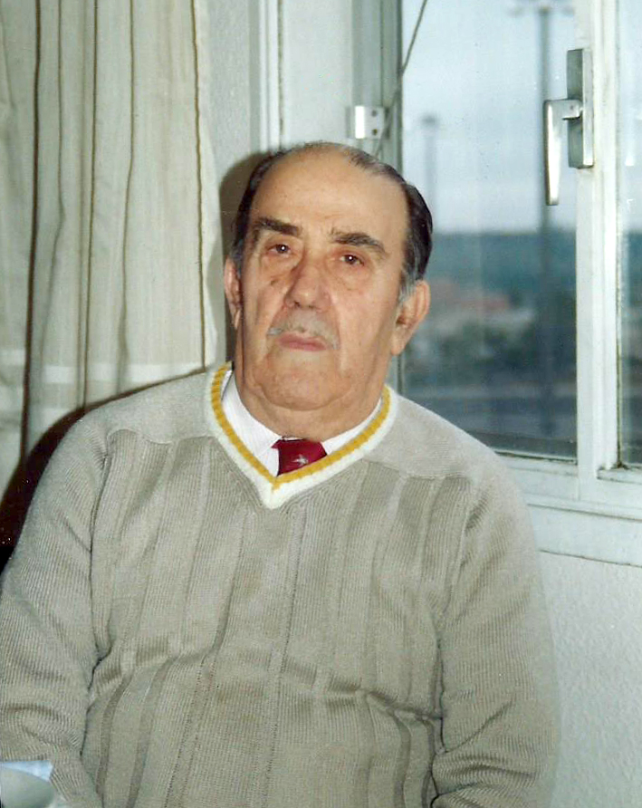 Fotografía del escultor José Barragán Rodríguez tomada en su domicilio de la calle Domingo de Zaizita de Madrid a finales de los años 1990.